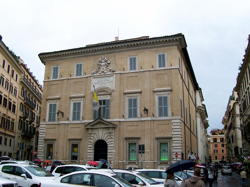 Roma - Palazzo di Propaganda Fide